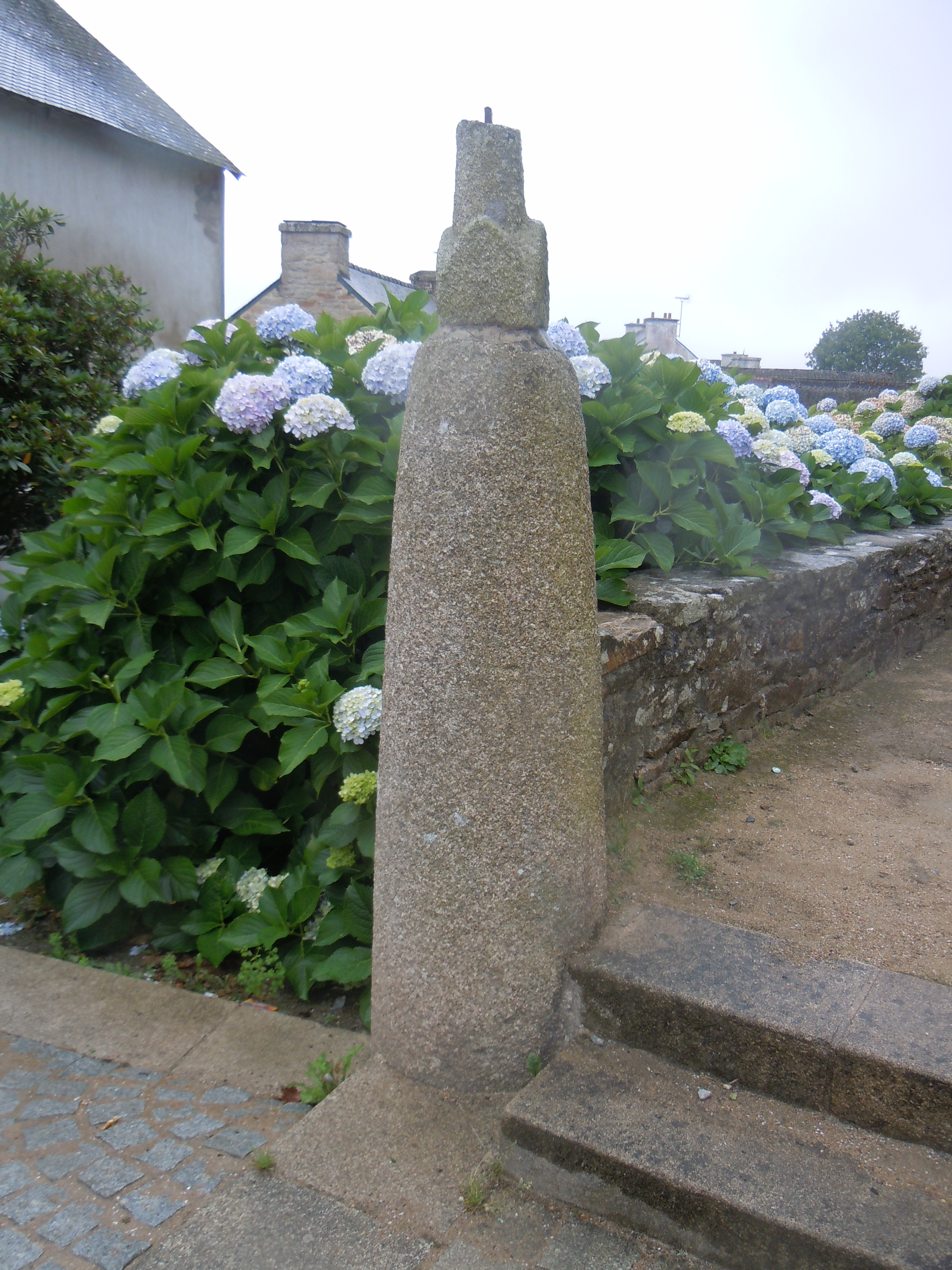 stèle de l'âge du fer dite stèle du père Julien Maunoir située dans le bourg de Saint-Thurien (Finistère) près de l'église.